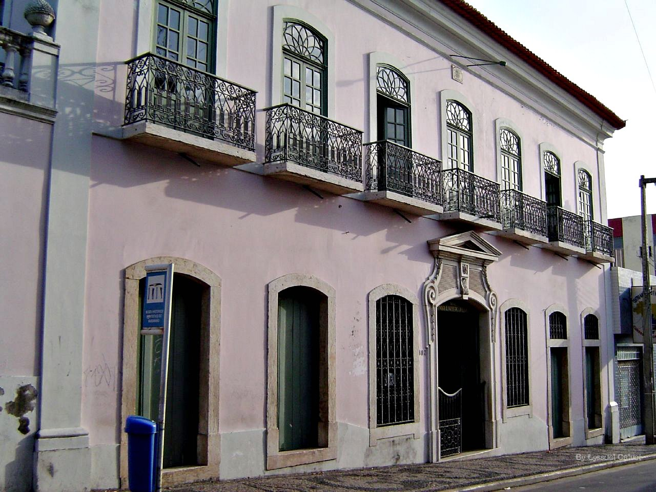 Projeto Reviver no Centro de São Luís